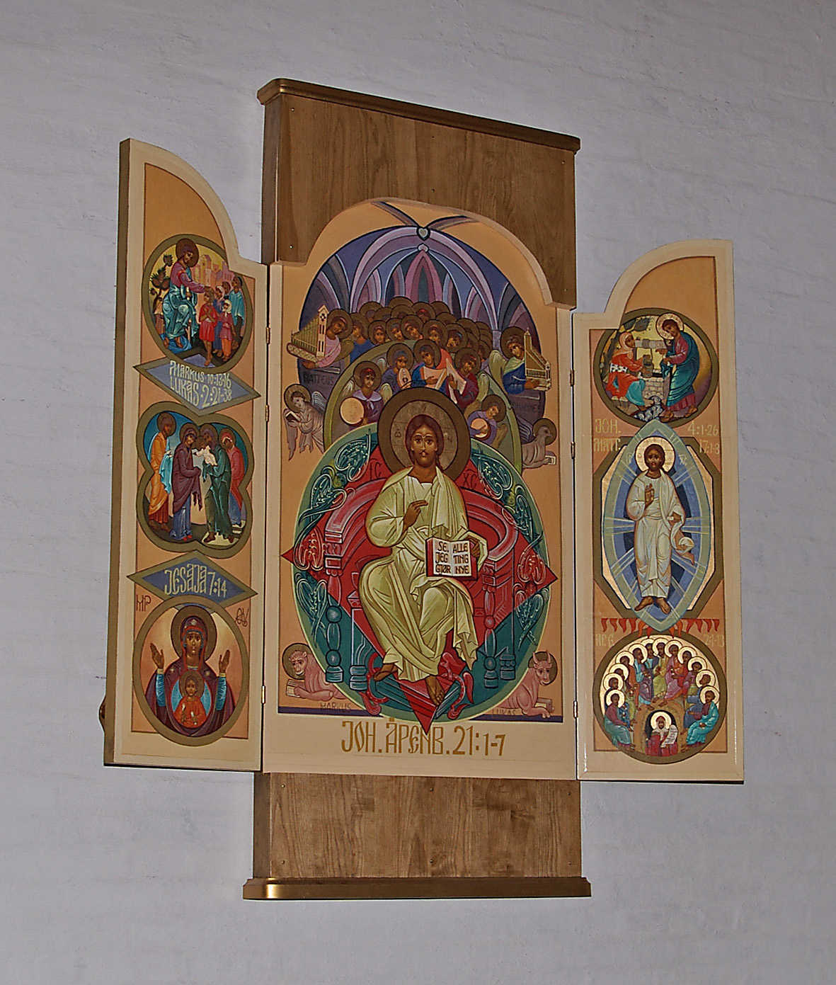 Konnerud kirke, Drammen, ikon